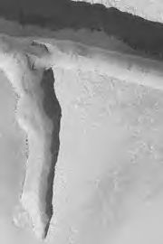 Cerberus Fossae, Mars MGS MOC Release No. MOC2-576, 16 December 2003